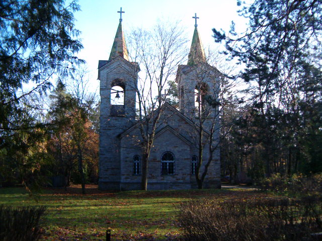 Paekivist historitsistlik kabel (1913). Rahumäe kalmistu, Tallinn. Arhitekt Anton Uesson (†1942)